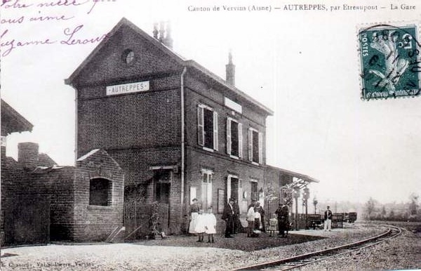 Carte postale de la gare en 1911